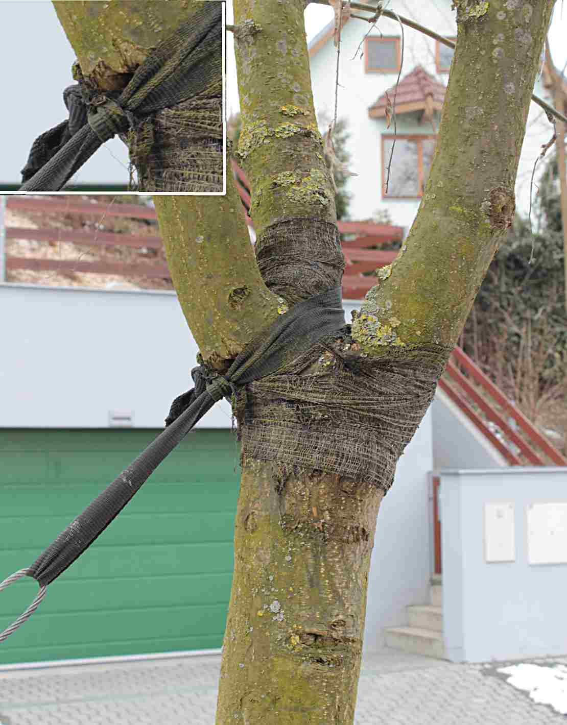 poškození úvazkem, veřejná zeleň, štědřenec Laburnum × watereri 'Vossii'.